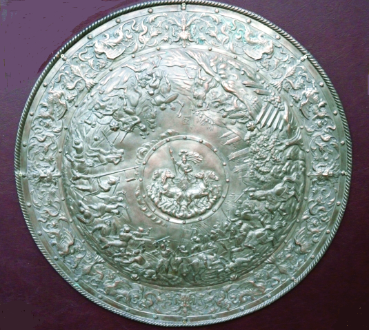 Bouclier ciselé en 1892 par Charles Brennus (1859-1943) comme trophée du Champion de France de Longue Paume à la demande de Pierre de Coubertin.